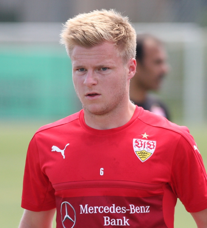 Jean Zimmer beim VfB-Training. Aufgenommen von